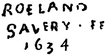 Signature Roelant Savery